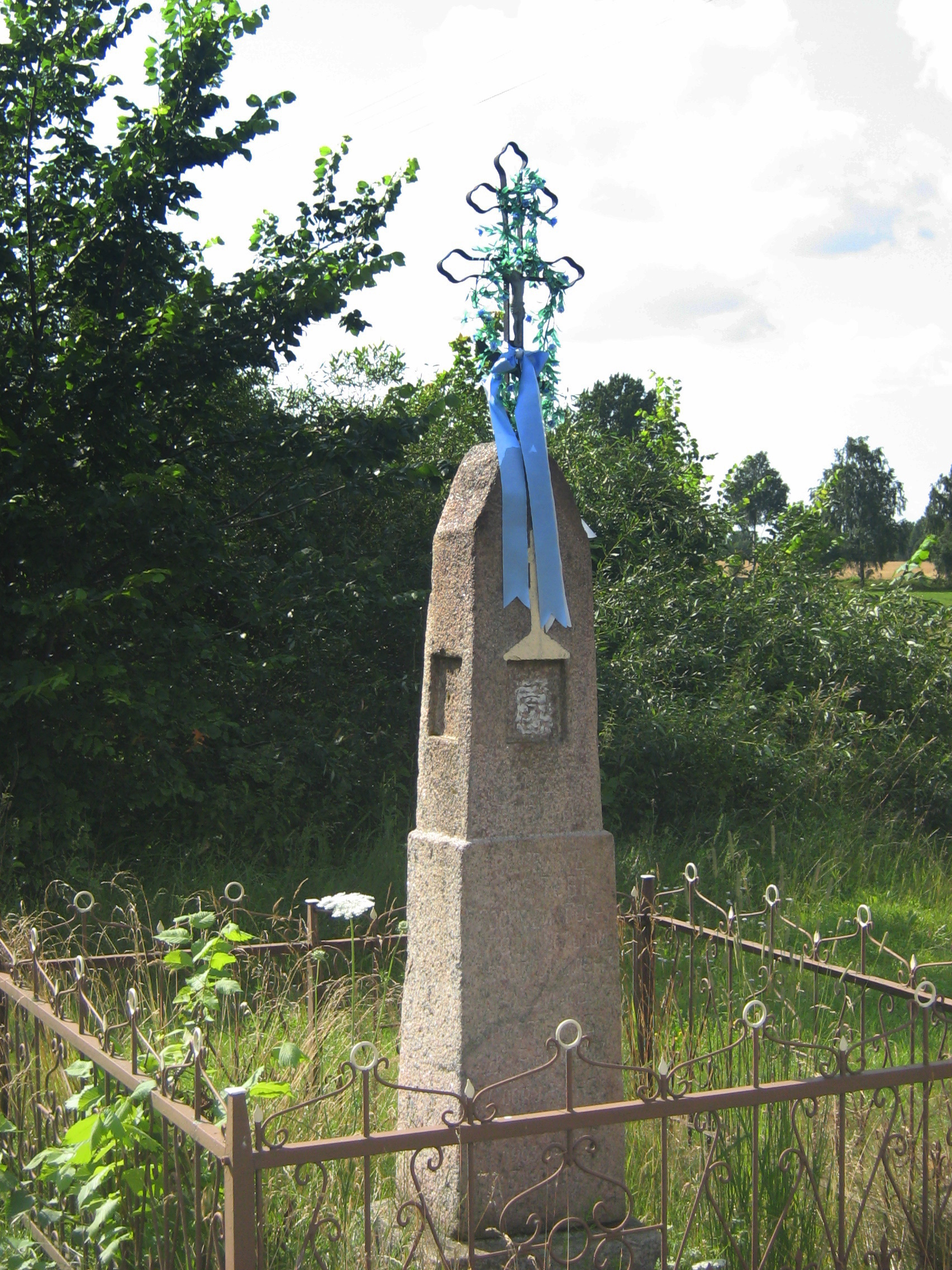 Pomnik-krzyż w Rzepiskach